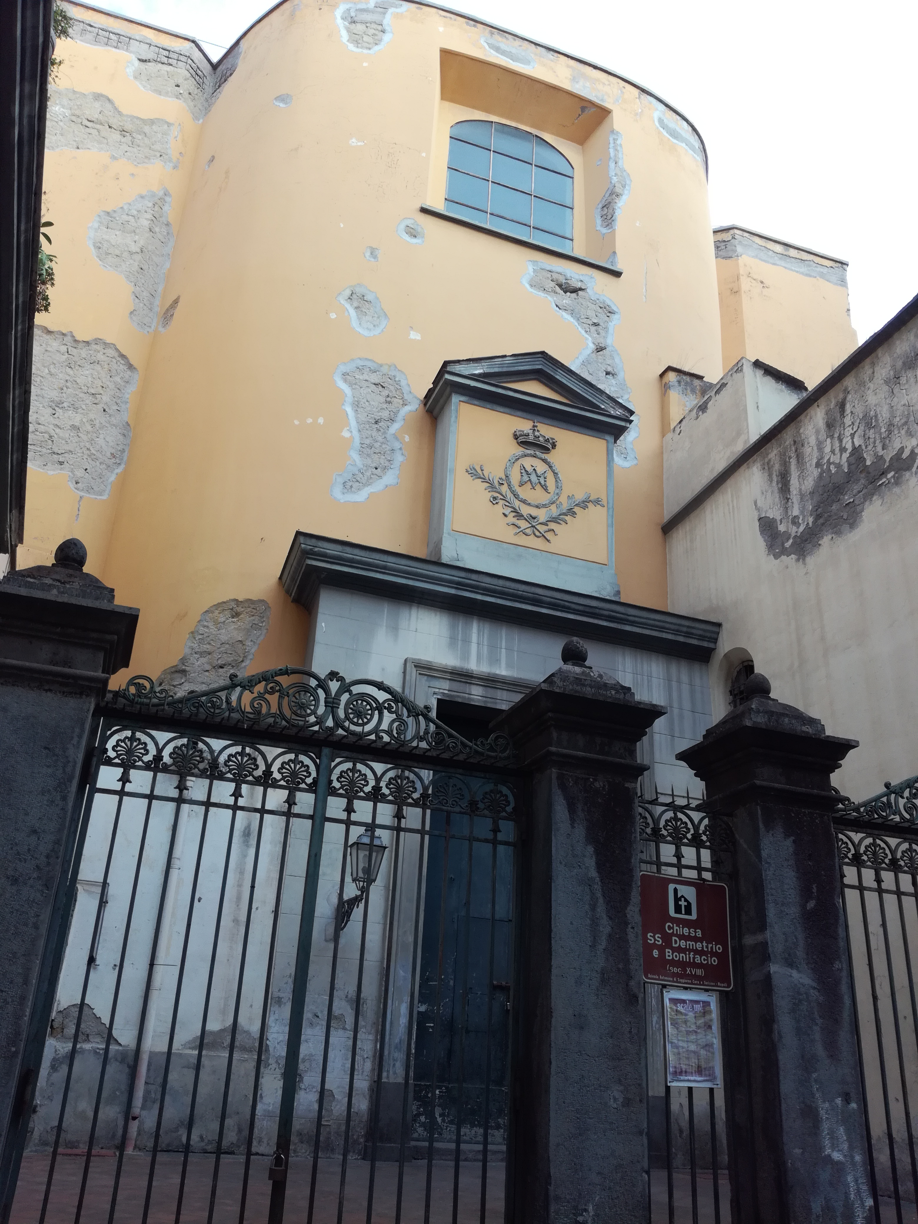 Esterno Demetrio e Bonifacio